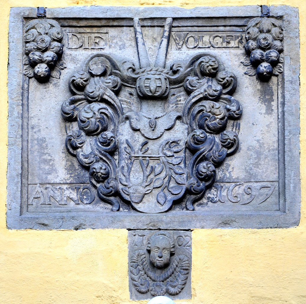 16997 datierter Wappenstein der Familie Volger aus Hannover sowie ein 1702 datierter Stein über dem Portal der Johannes-der-Täufer-Kirche in Wettbergen ...